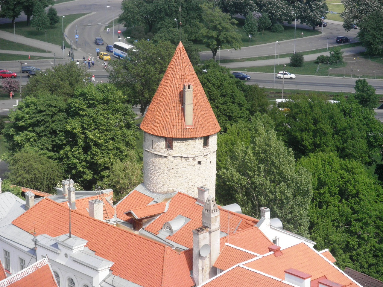 Stoltingi torn Oleviste kiriku tornist.